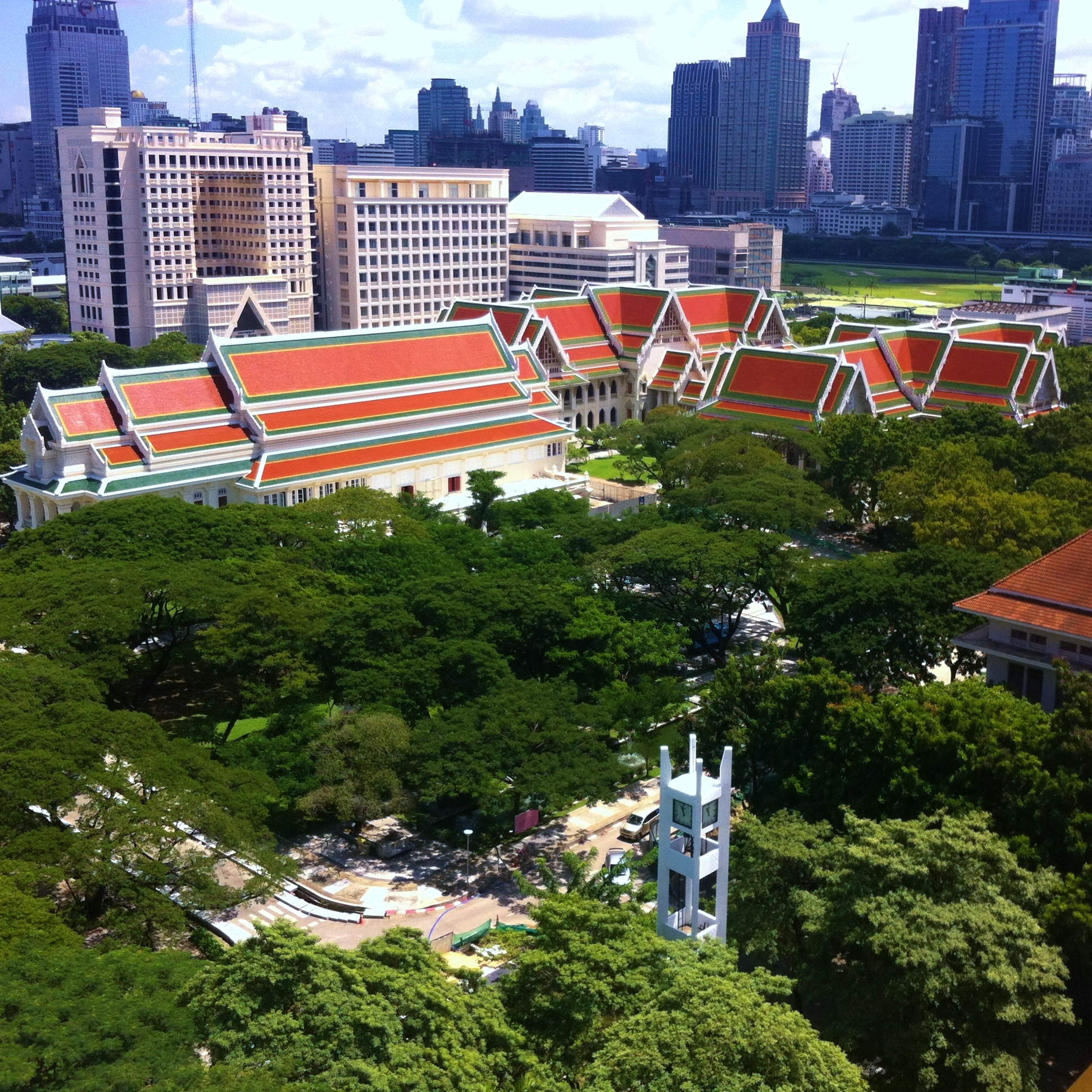 กลุ่มอาคารของคณะอักษรศาสตร์และหอประชุมจุฬาลงกรณ์มหาวิทยาลัย Category:Chulalongkorn University Category:Chulalongkorn University Auditorium